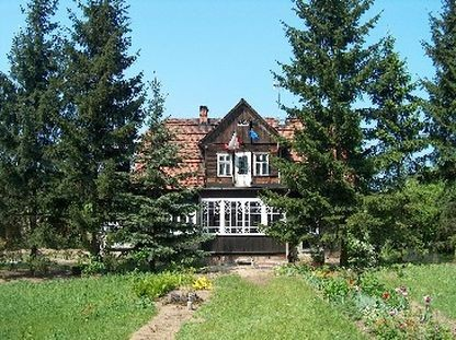 moja własna praca - dom w Otłoczynie z 1931 roku